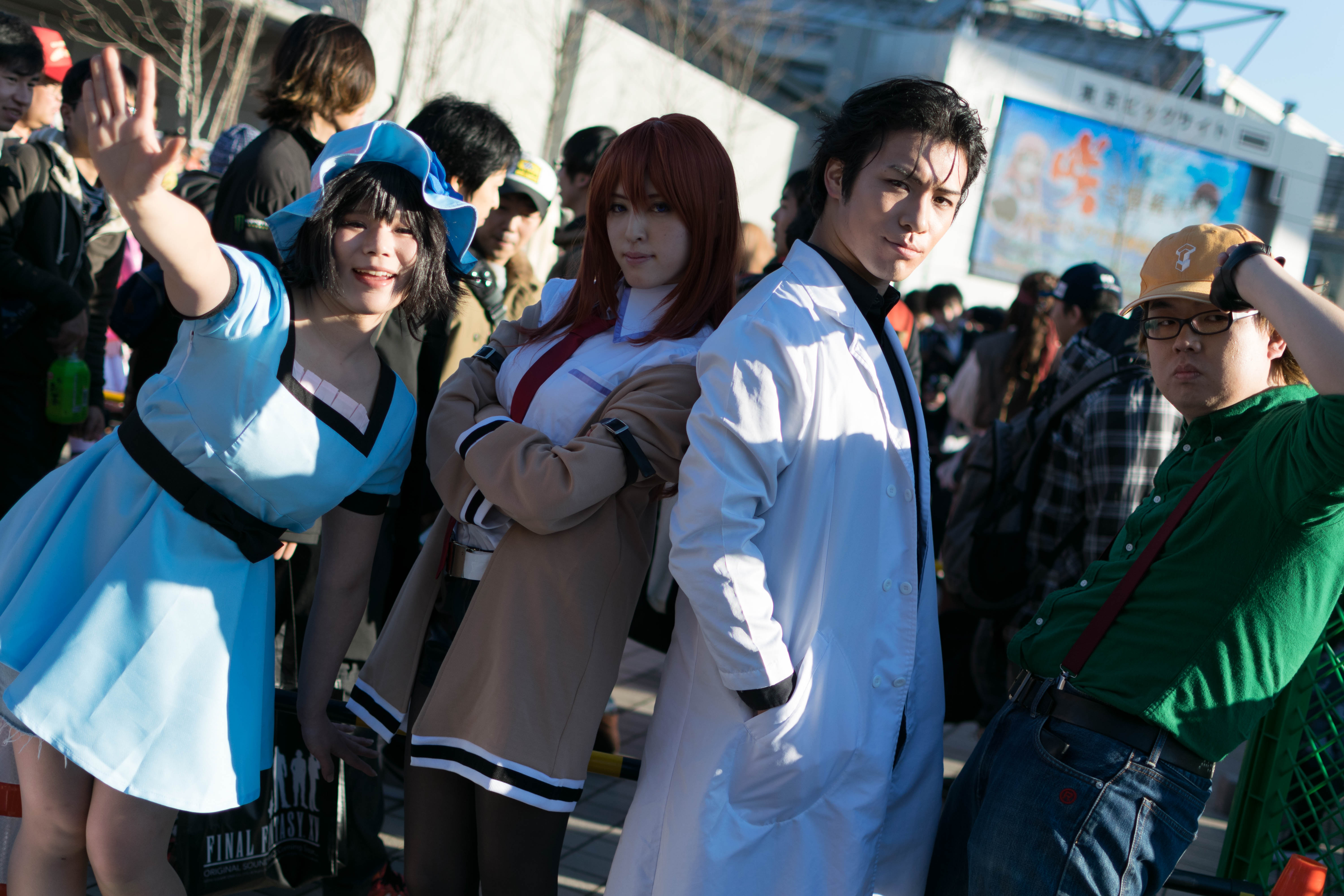 Steins;Gate